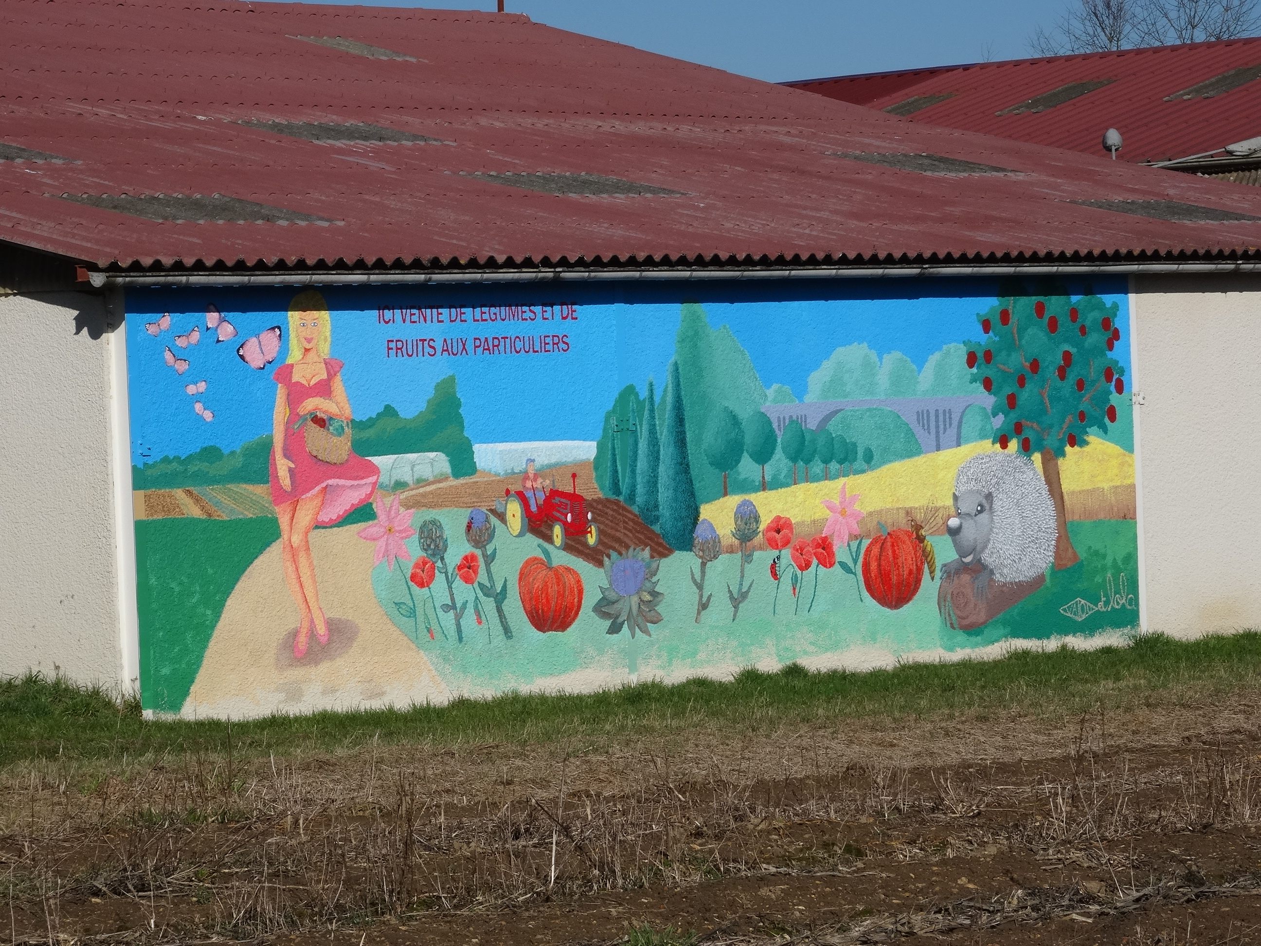 Fresque murale à Argentières. .(Seine-et-Marne, région Île-de-France).